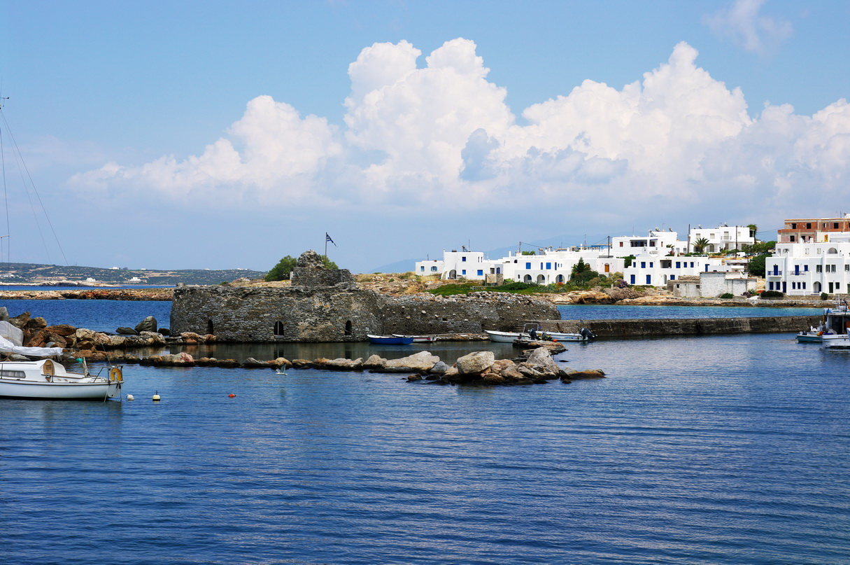 Venezianischer Rundturm, Hafen von Naoussa